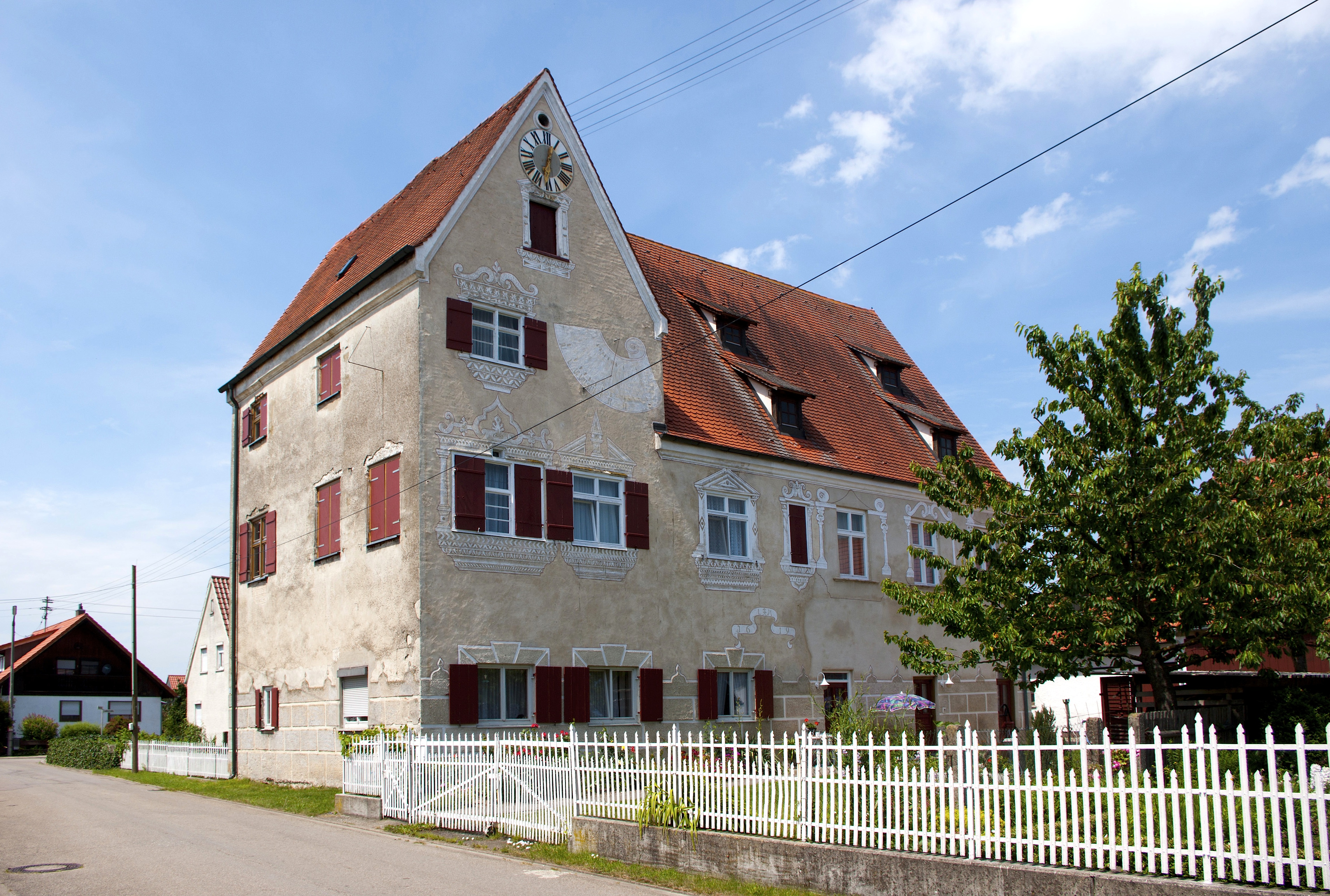 erbaut 1619, heute Bauernhof